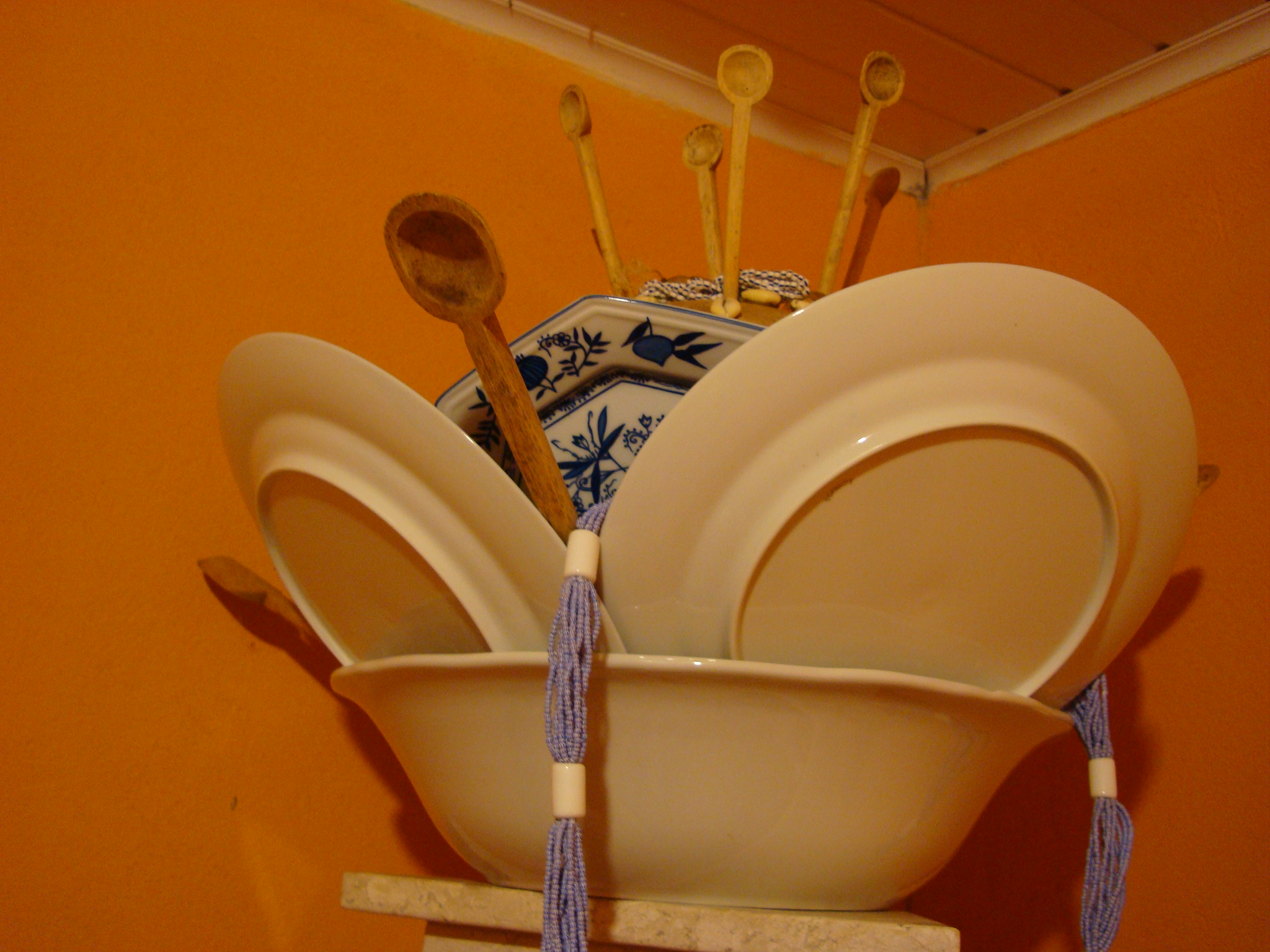 Assentamento sagrado do Orixá Nanã, Orossi.